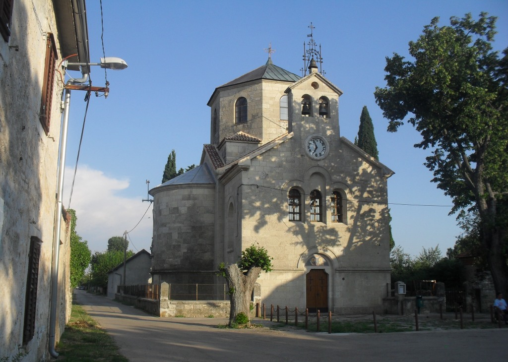 Храм СПЦ Св. Кирила и Методија у Кистањама, Далмација